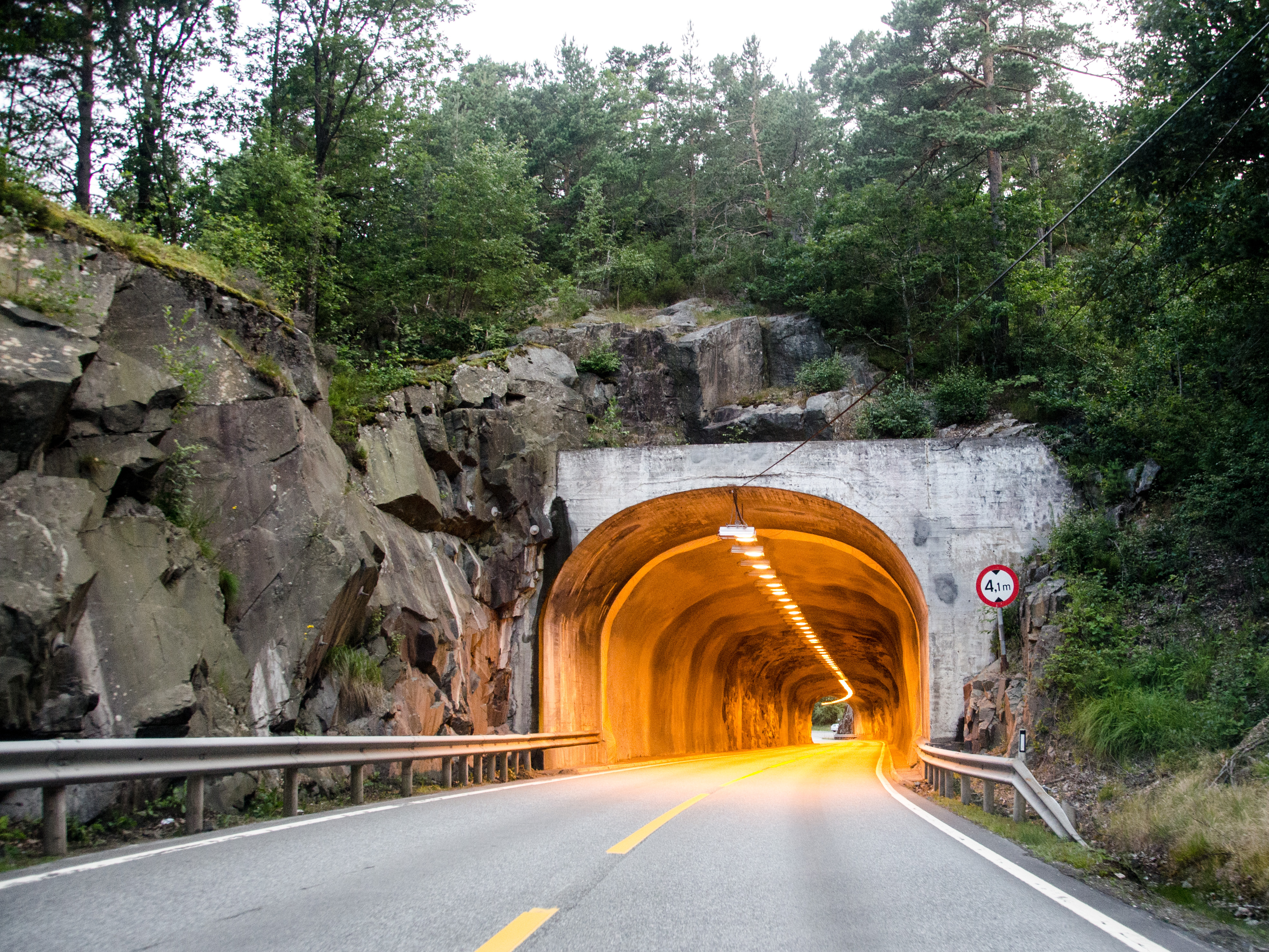 Bjorviktunnelen på Rv420